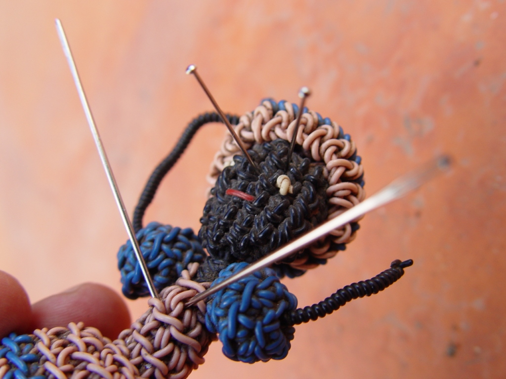 Muñeco vudú